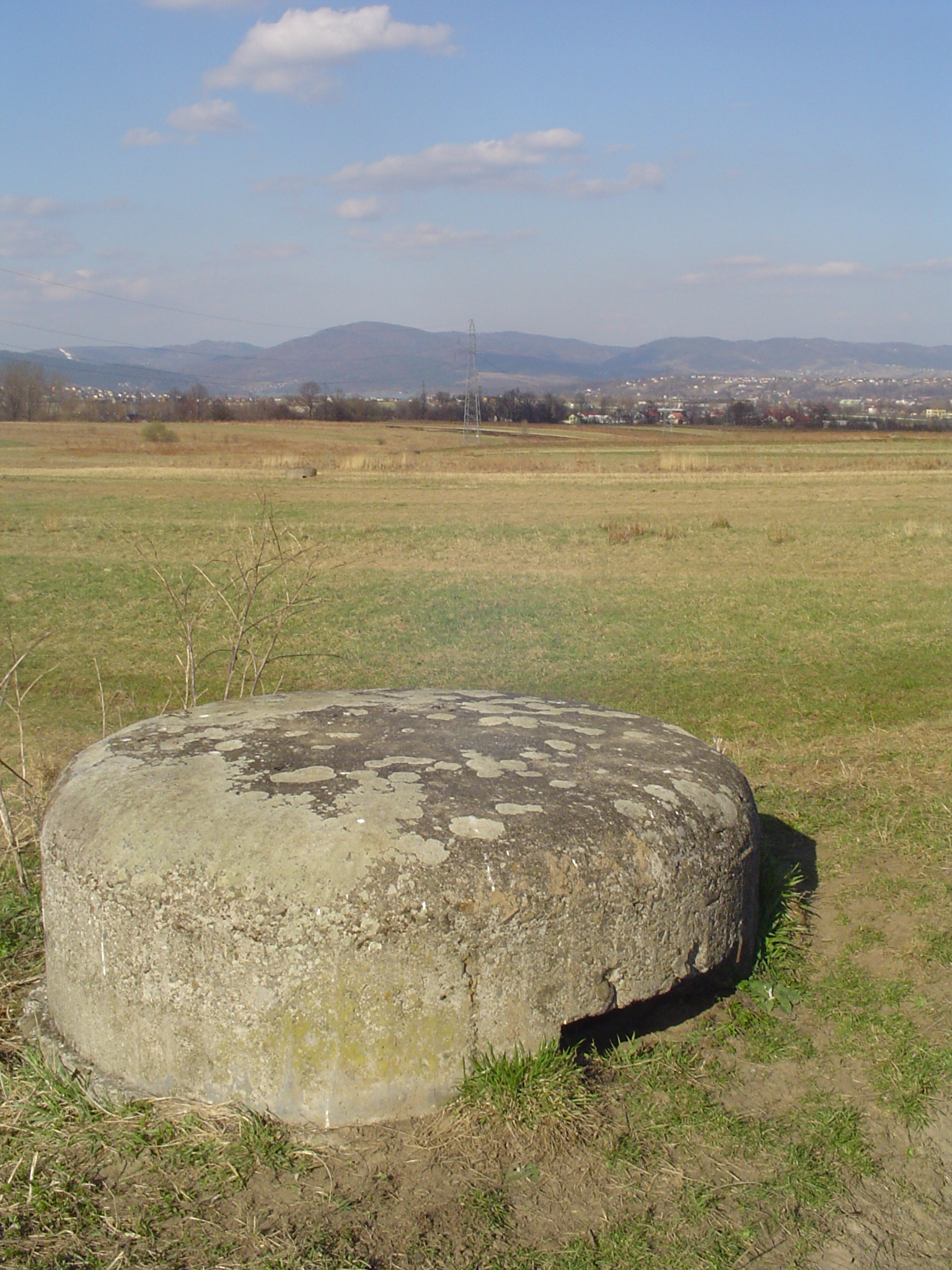 Bunkier pod Dzielcem (północne zbocze), w dali widoczny następny bunkier.